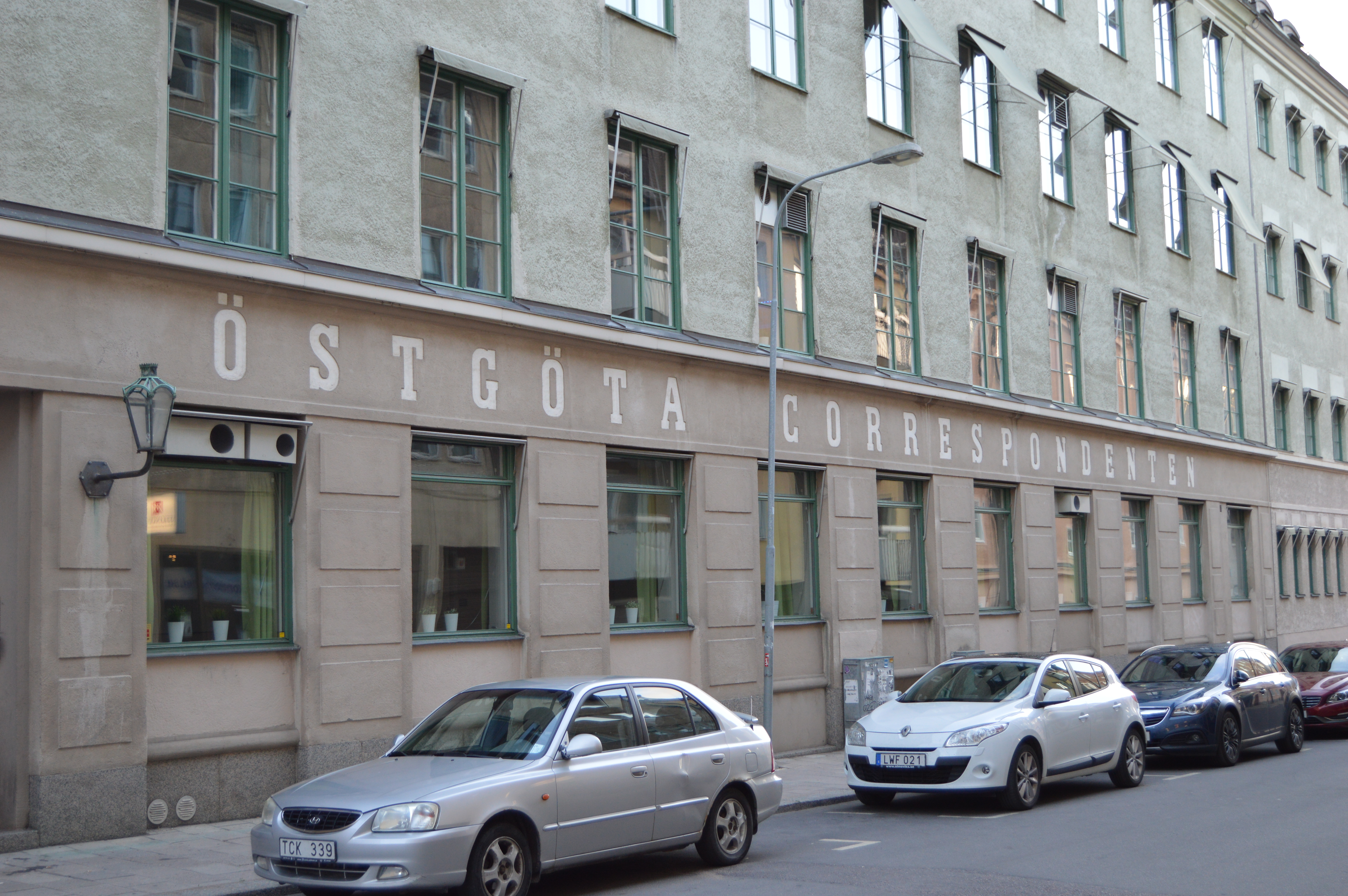 Correns hus i Linköping.